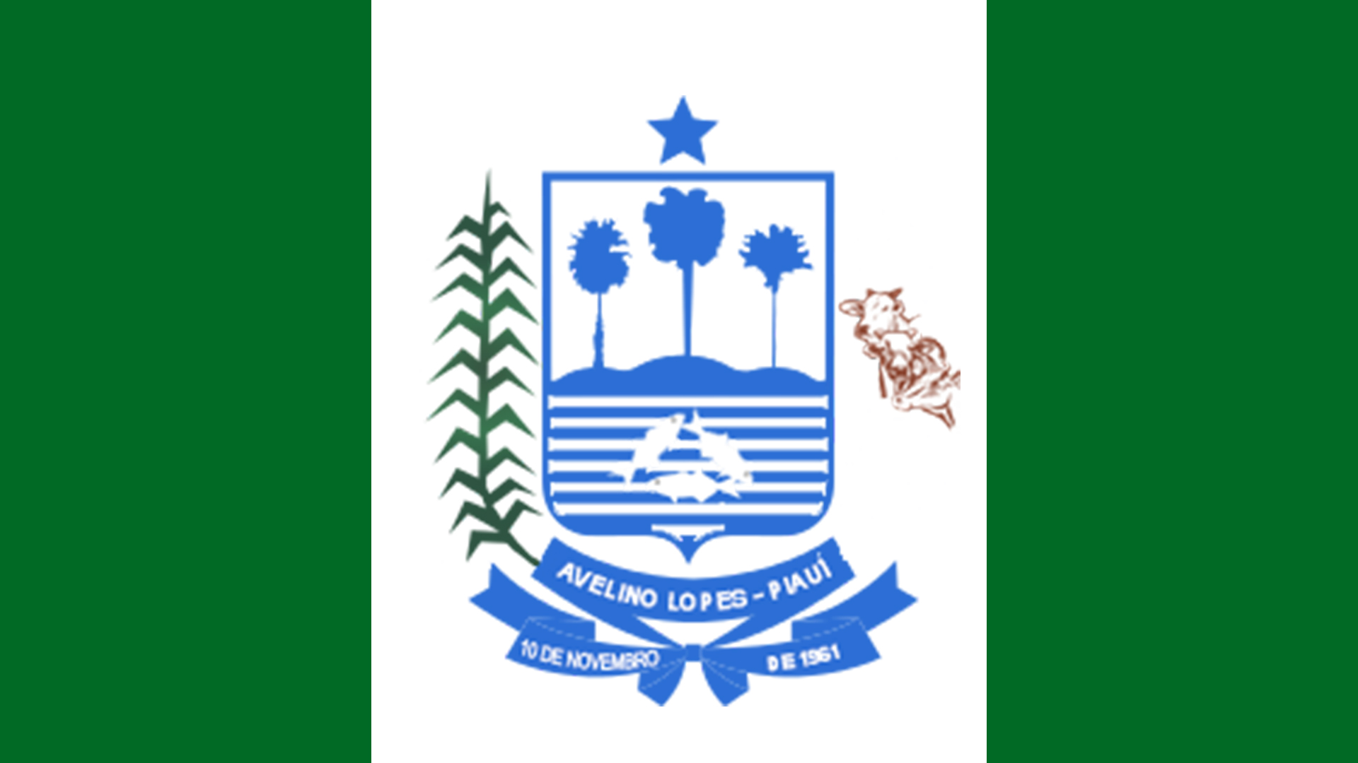 Bandeira da cidade de Avelino Lopes de cunho público.